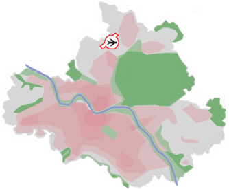 selbst angefertigt, basiert auf dem Bild:Dresden-ortsaemter.png gemeinfrei Lage des Flughafens Dresden in Dresden